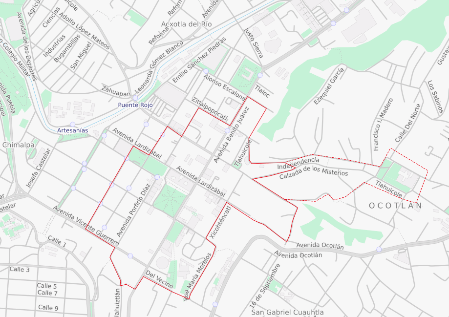 Zona de Monumentos Históricos de la Ciudad de Tlaxcala